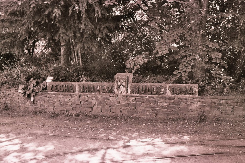 Portalrest des einzigen Bochumer Eisenbahntunnels am Hasenwinkeler Kohlenweg, „Zeche Baaker Mulde 1894“